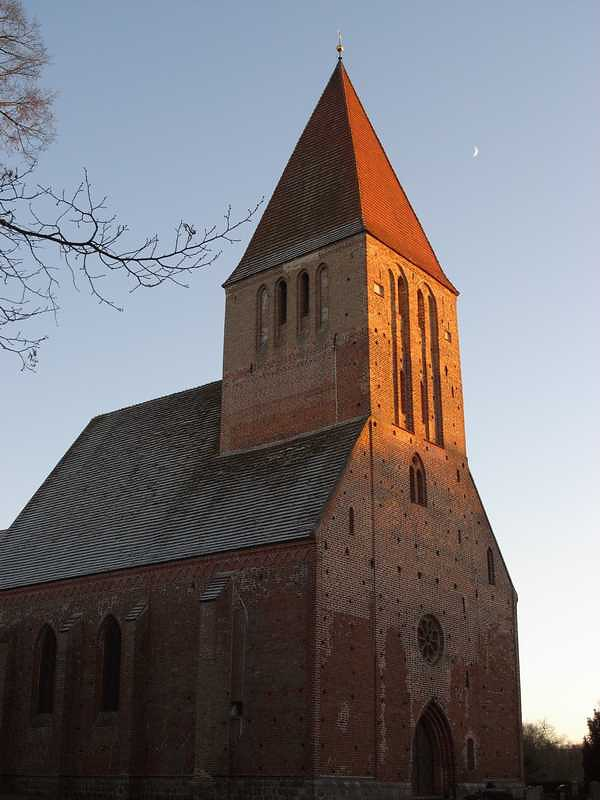 Kirche in Reinshagen